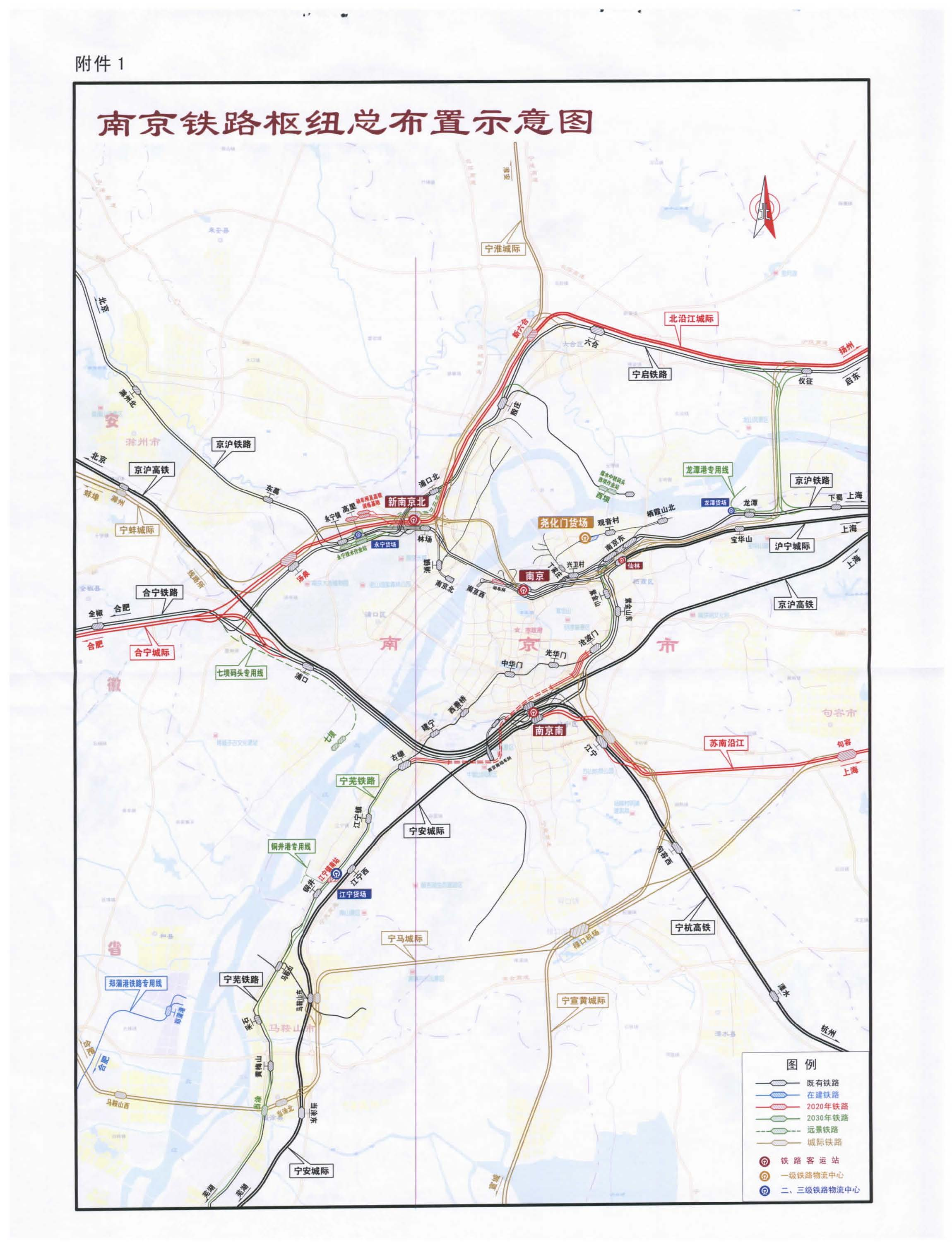 中文（中国大陆）: 南京铁路枢纽总布置示意图